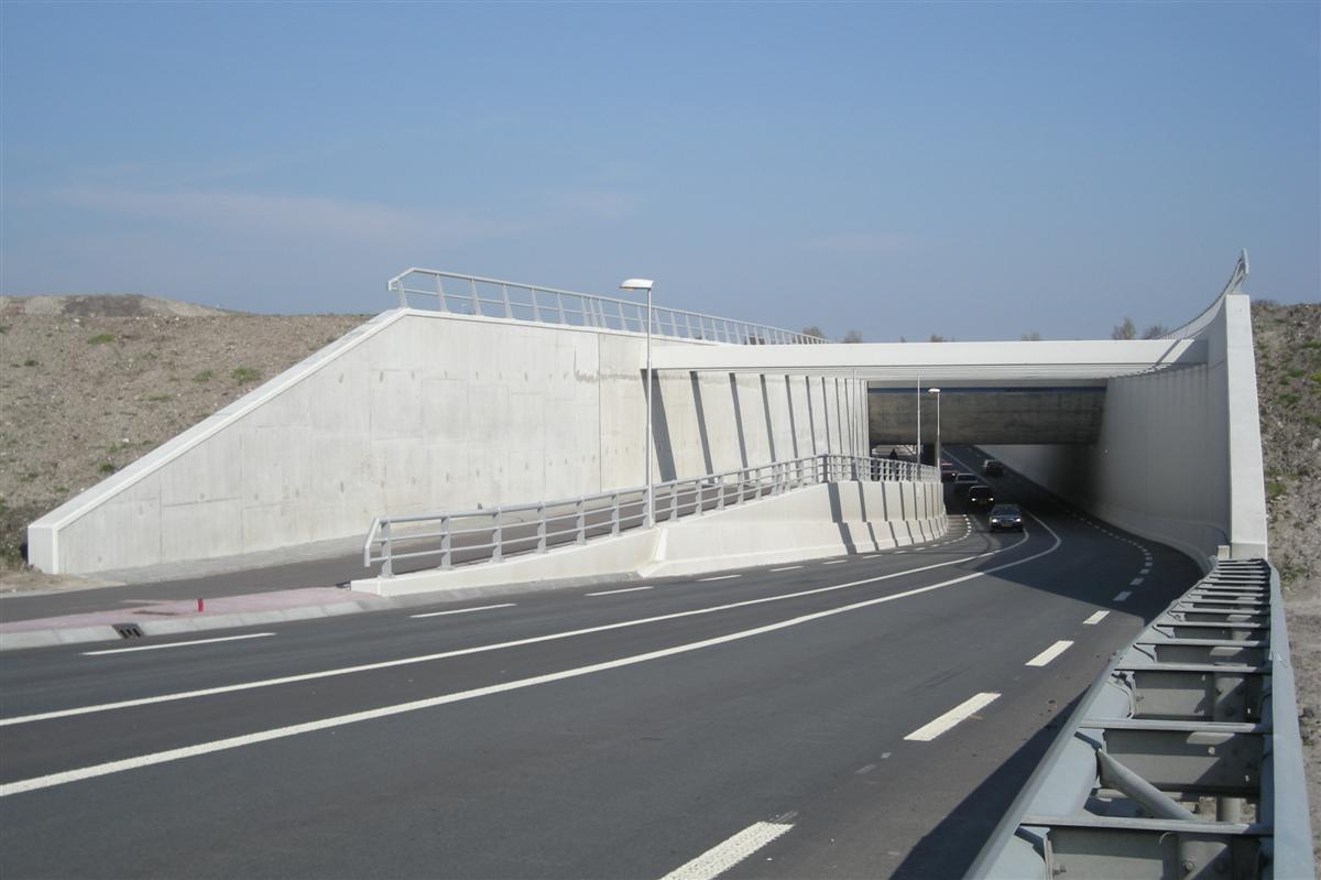 Jeltesleat Akwadukt, een aquaduct in de Jeltesleat (Jeltesloot) bij Hommerts, Friesland.